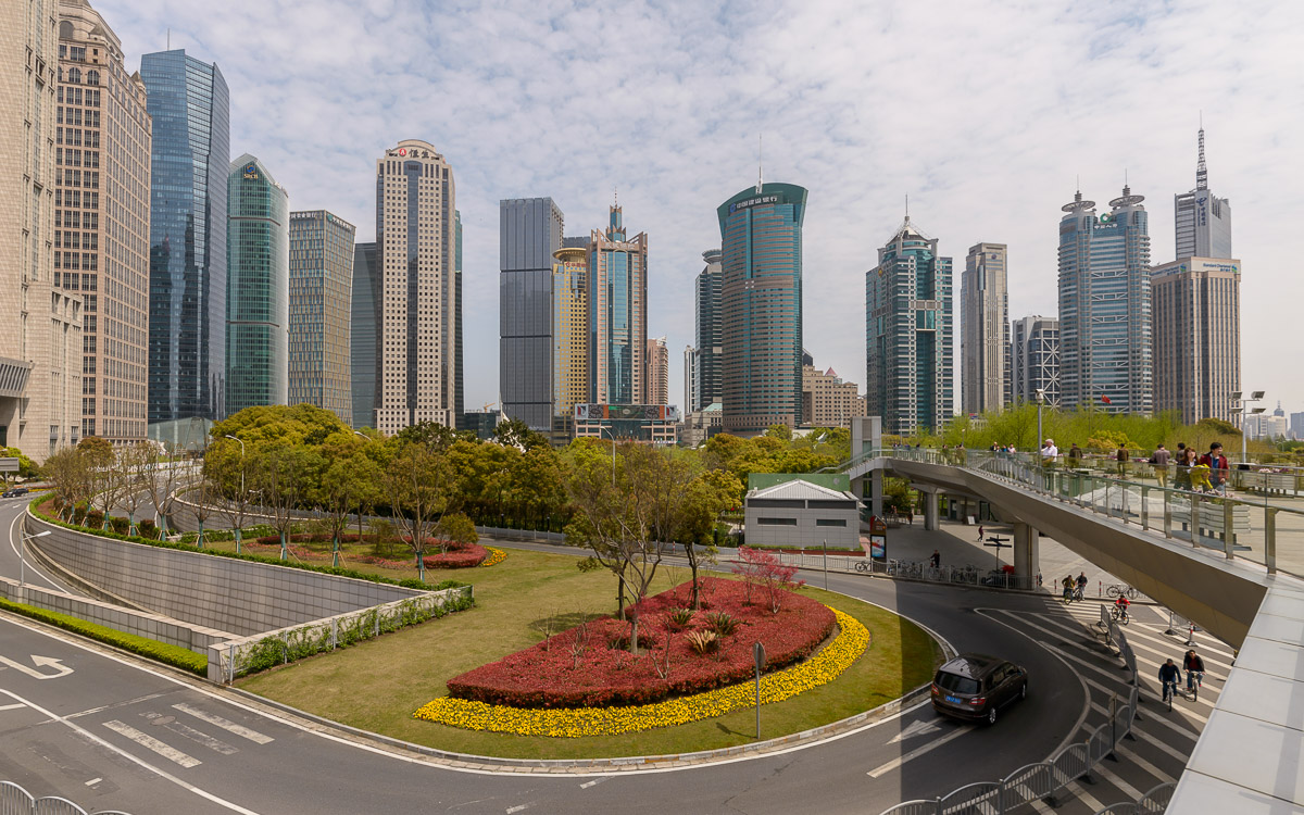 Shanghai, Pudong, Lujiazui